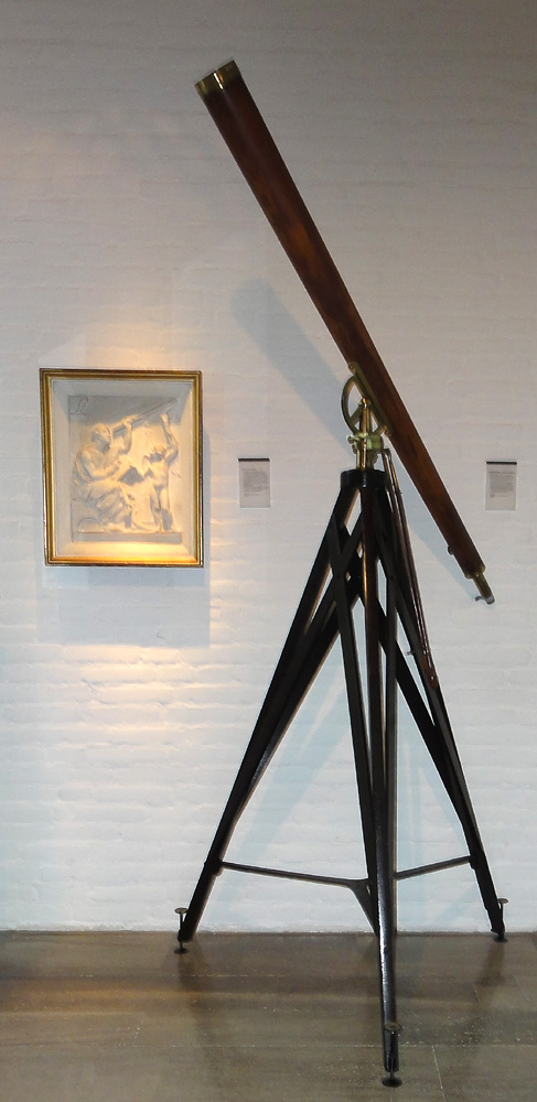 Fernrohr von Heinrich Wilhelm Olbers (1758–1840). Hergestellt in der Werkstatt von John Dollond, London um 1800. Quelle: Focke Museum Bremen.